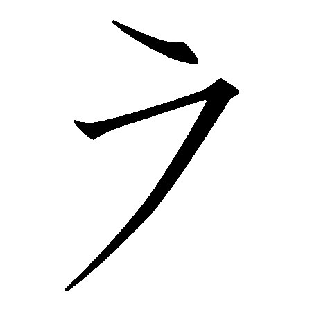 Unicode、カタカナの旧エです